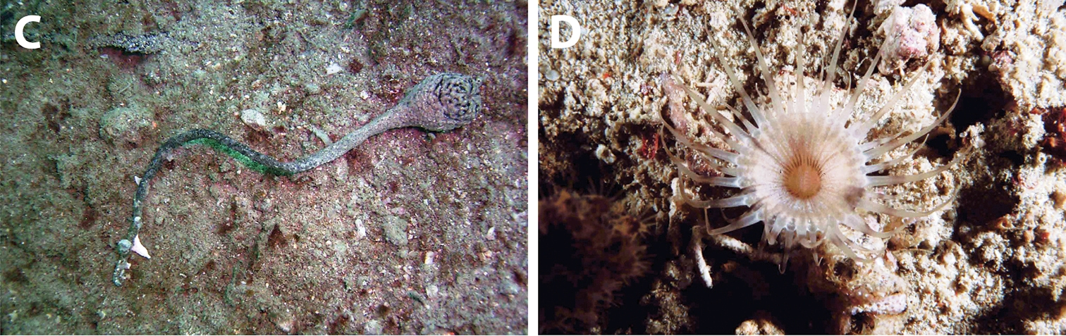 Sphenopus pedunculatus. C: espécimen en Pulau Tikus, Jakarta,Indonesia, profundidad = 30 m, D: Pulau Derawan, Kalimantan, Indonesia, profundidad = 15 m. Reimer J, Poliseno A, Hoeksema B (2014) Shallow-water zoantharians (Cnidaria, Hexacorallia) from the Central Indo-Pacific. ZooKeys 444: 1-57.